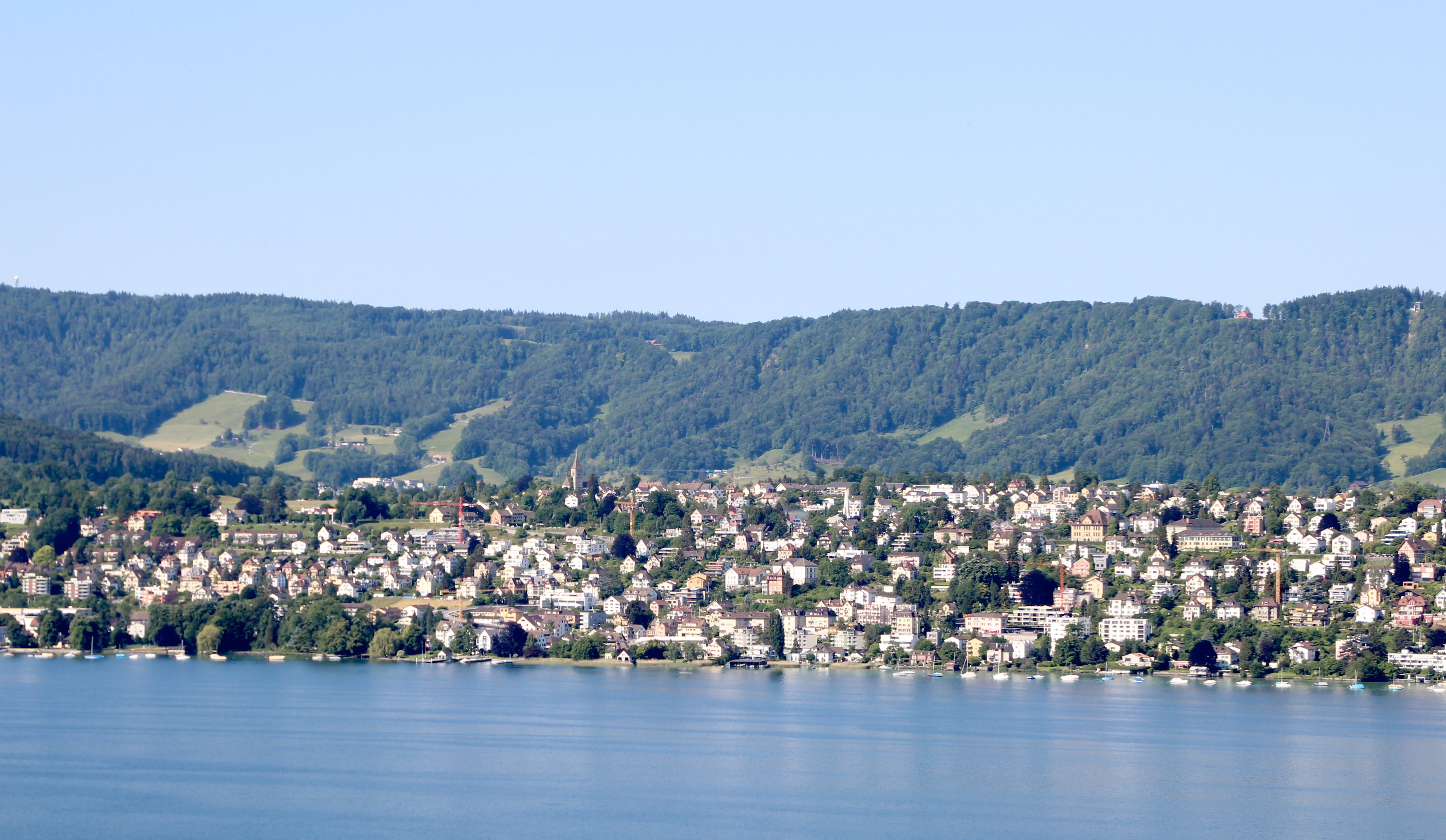 Kilchberg ZH